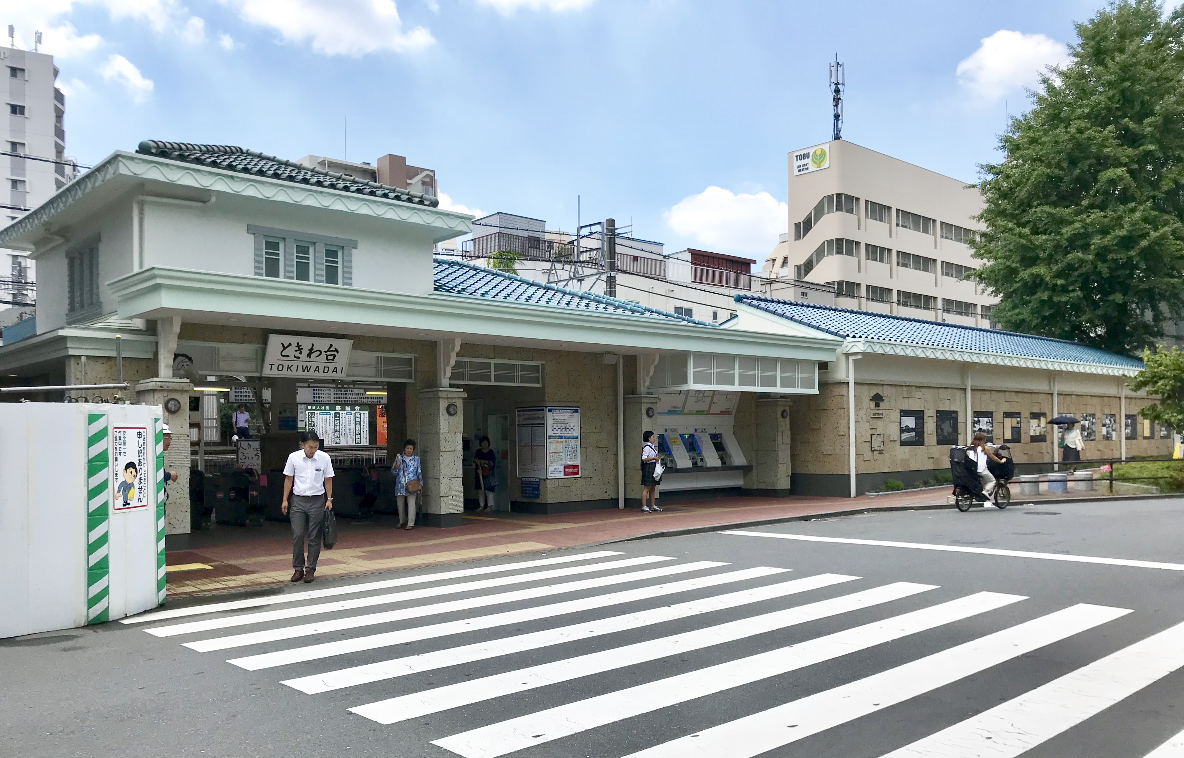 東武東上線ときわ台駅北口駅舎（リニューアル後）